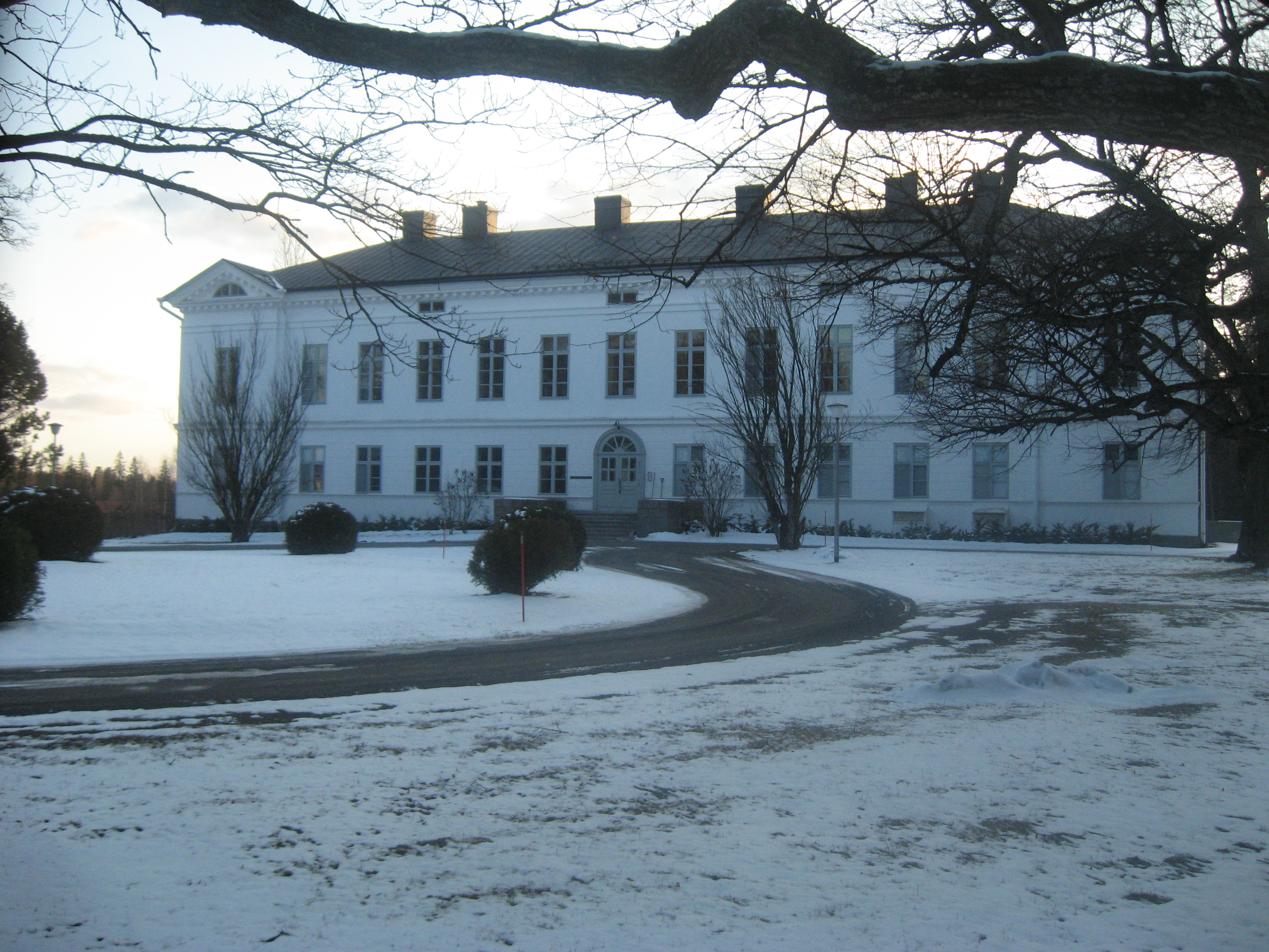 Jokioisten kartanon päärakennus.